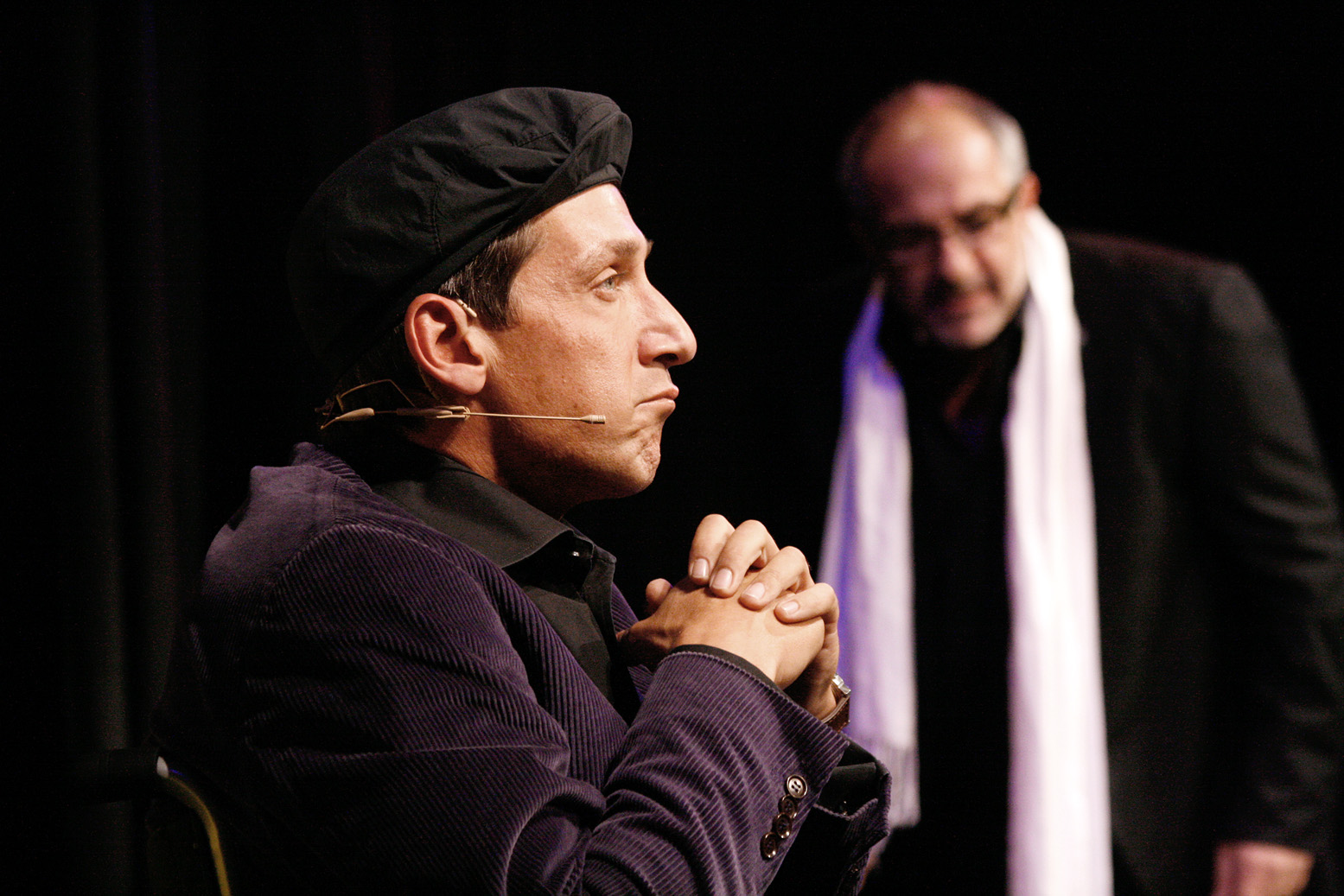 Michael Niavarani und Viktor Gernot bei der Verleihung des Österreichischen Kabarettpreises 2010 im Vindobona in Wien.